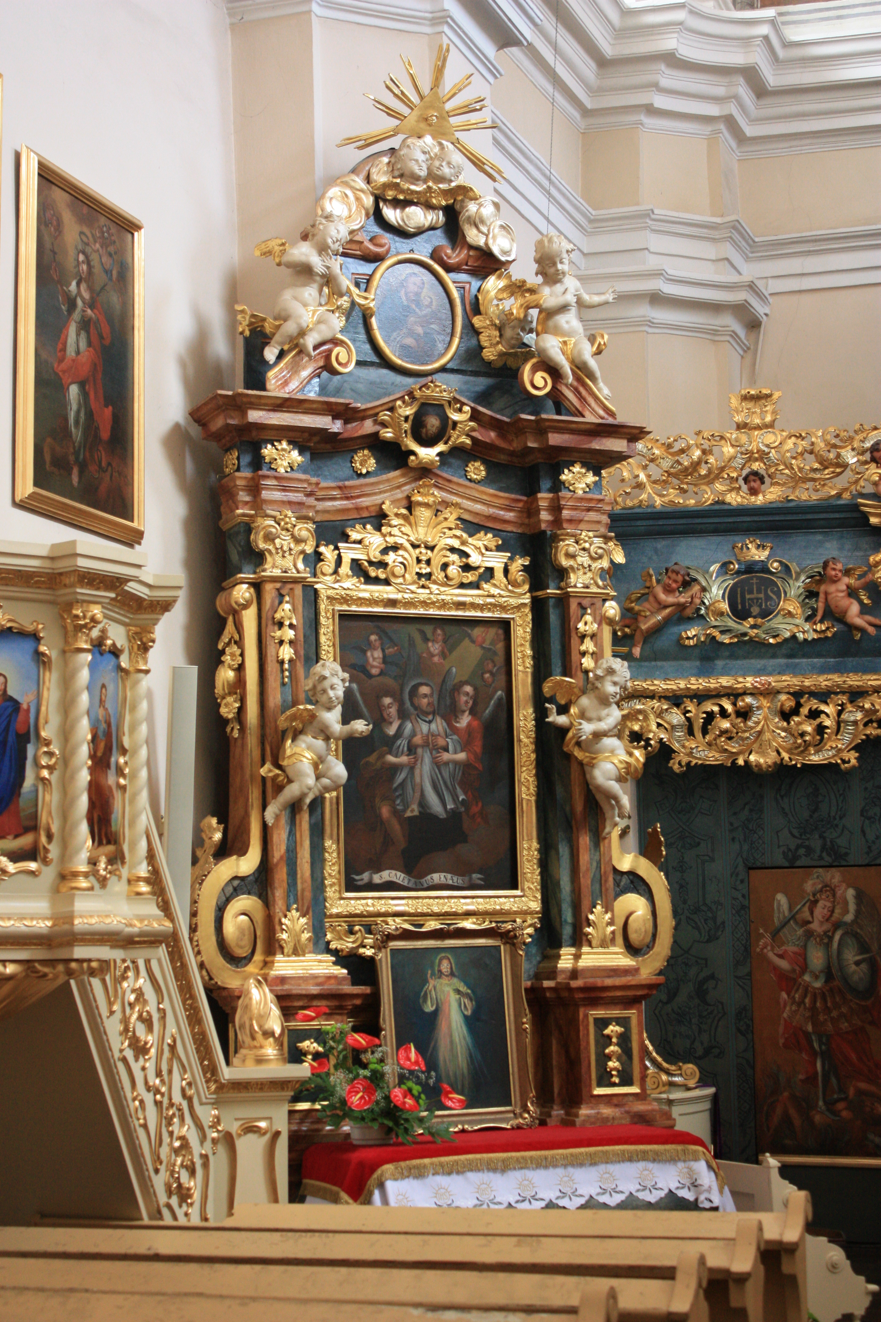 Kościół Najświętszej Krwi Pana Jezusa w Poznaniu. Lewy ołtarz boczny.